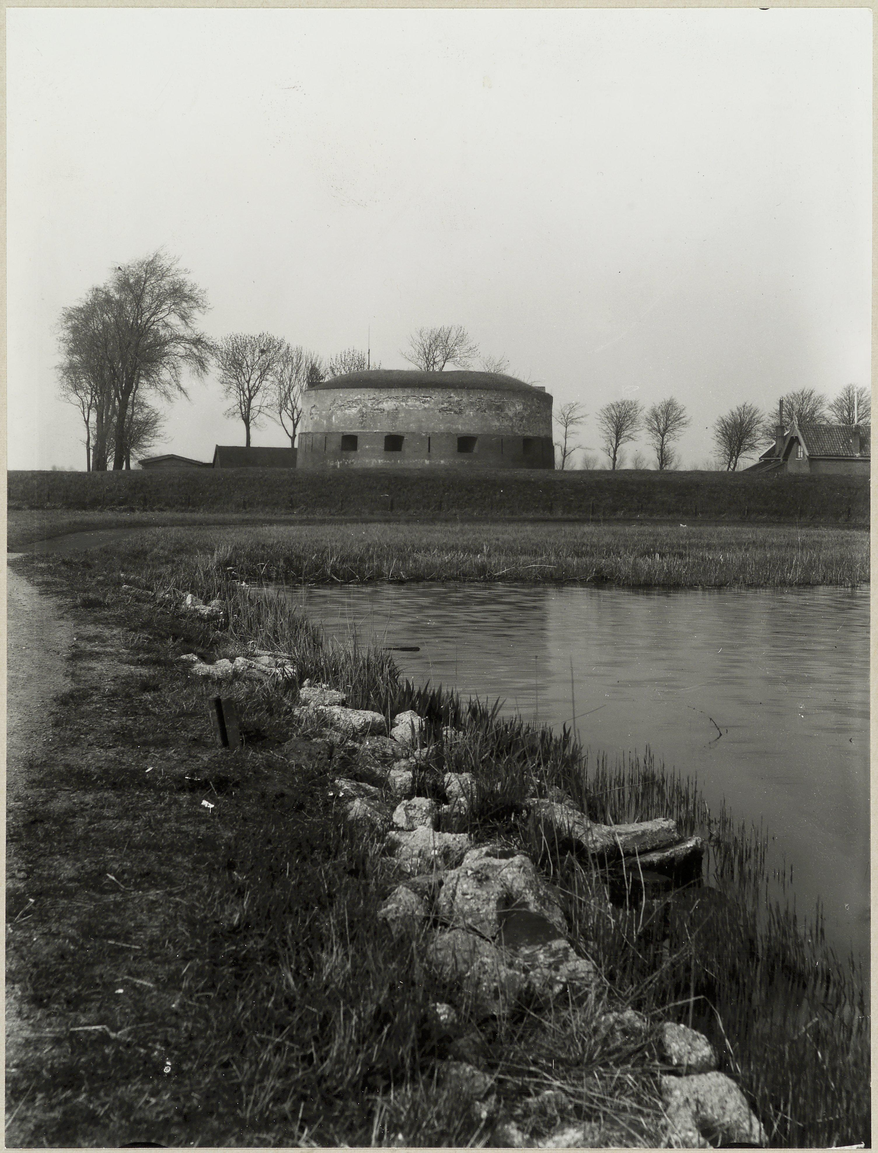 Fort: Fort bij Schiphol (opmerking: Glasnegatief vermist mei 2003, gedigitaliseerd van afdruk in de collectie)